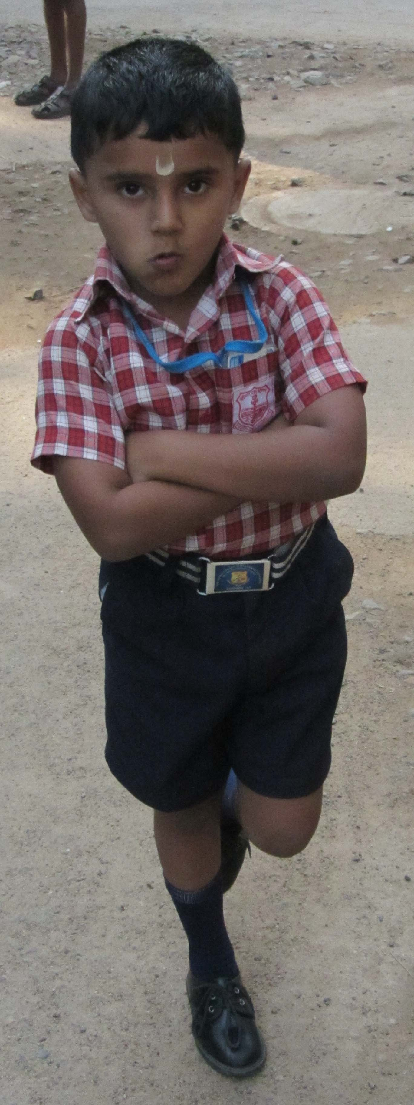 கொக்கு விளையாட்டில் ஒற்றைக் காலில் அதிக நேரம் நின்றவர் வென்றவர். own shot